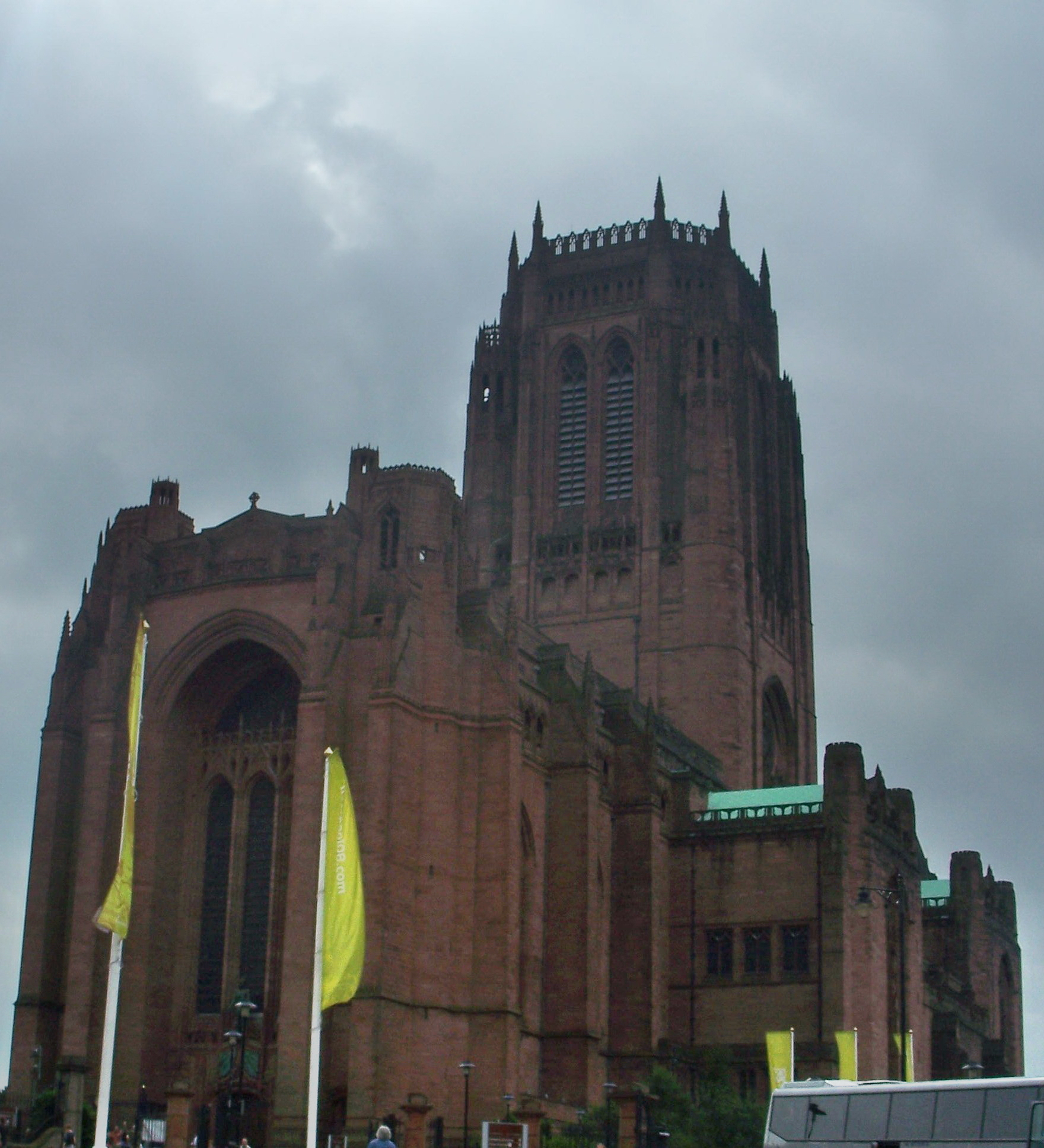 Nova_Catedral_de_Liverpool_2008